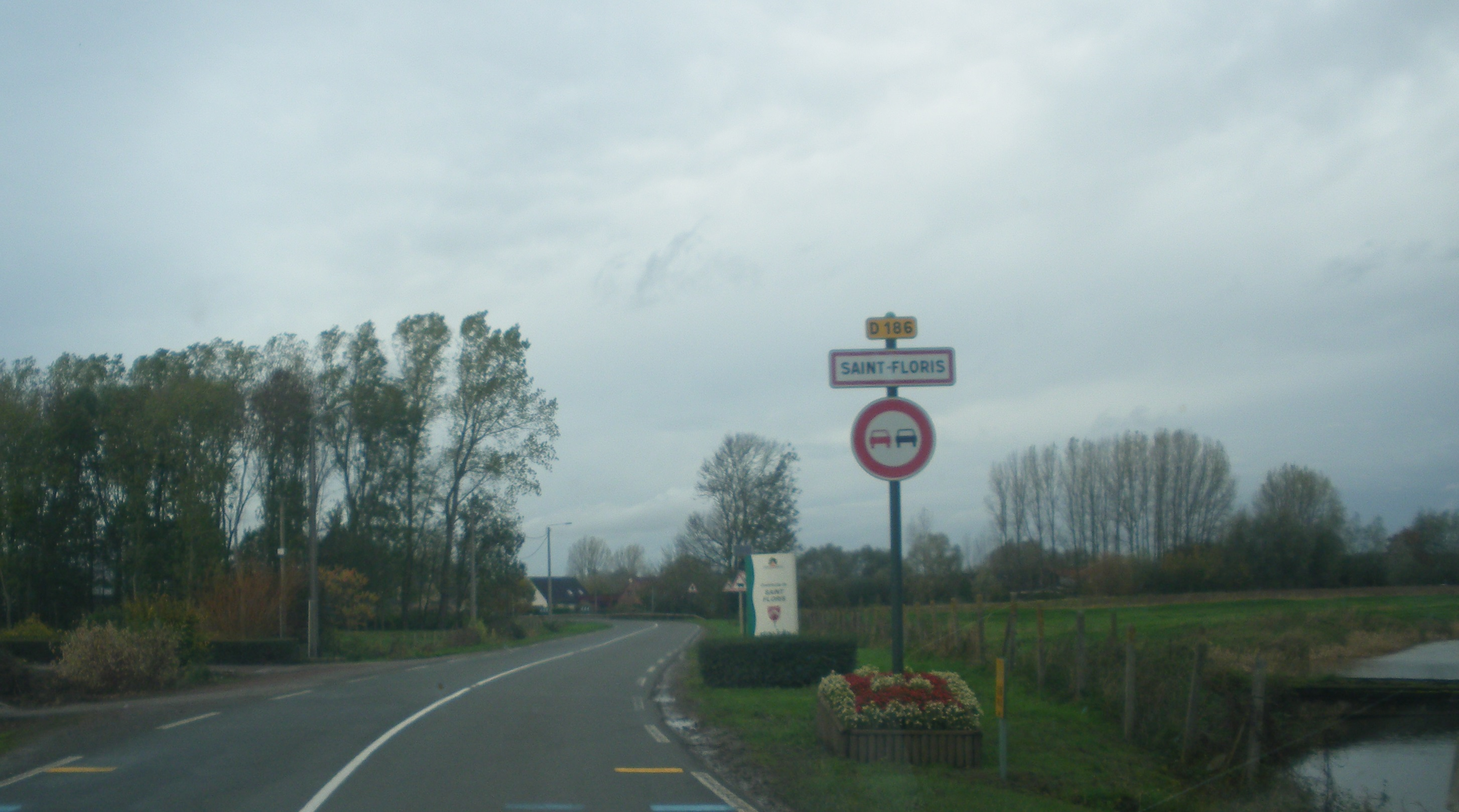 Panneau d'entrée de la commune de Saint-Floris.